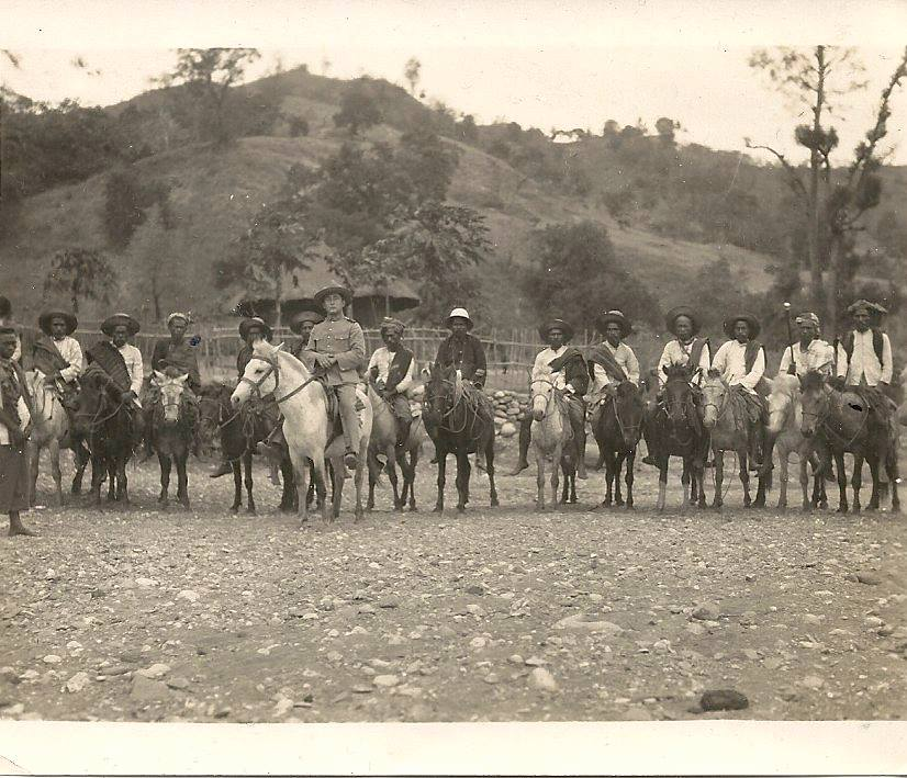 Einheimische Reitertruppen unter Führung des portugiesischen Offiziers António Macedo, Kommandant in Balibo, Portugiesisch-Timor